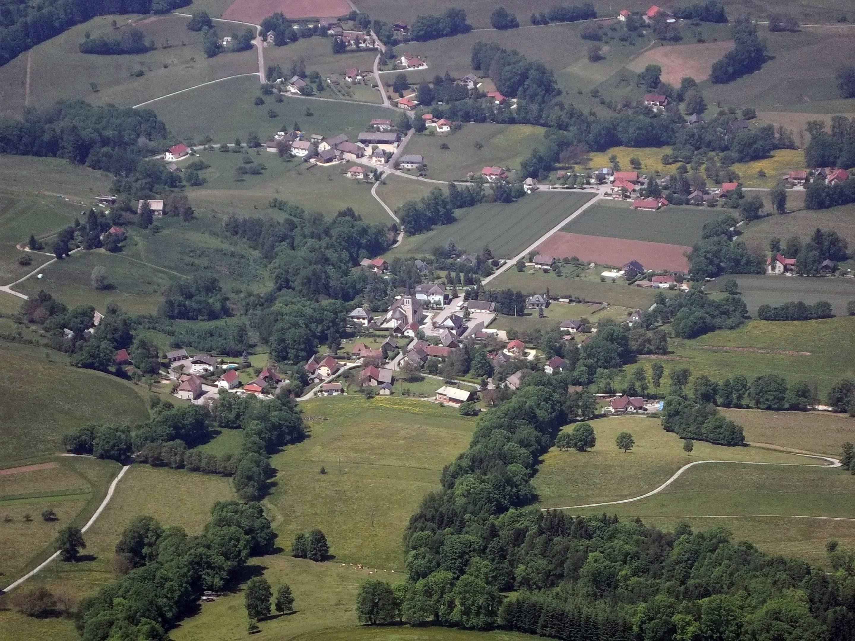 Vue depuis le Mt Grêle